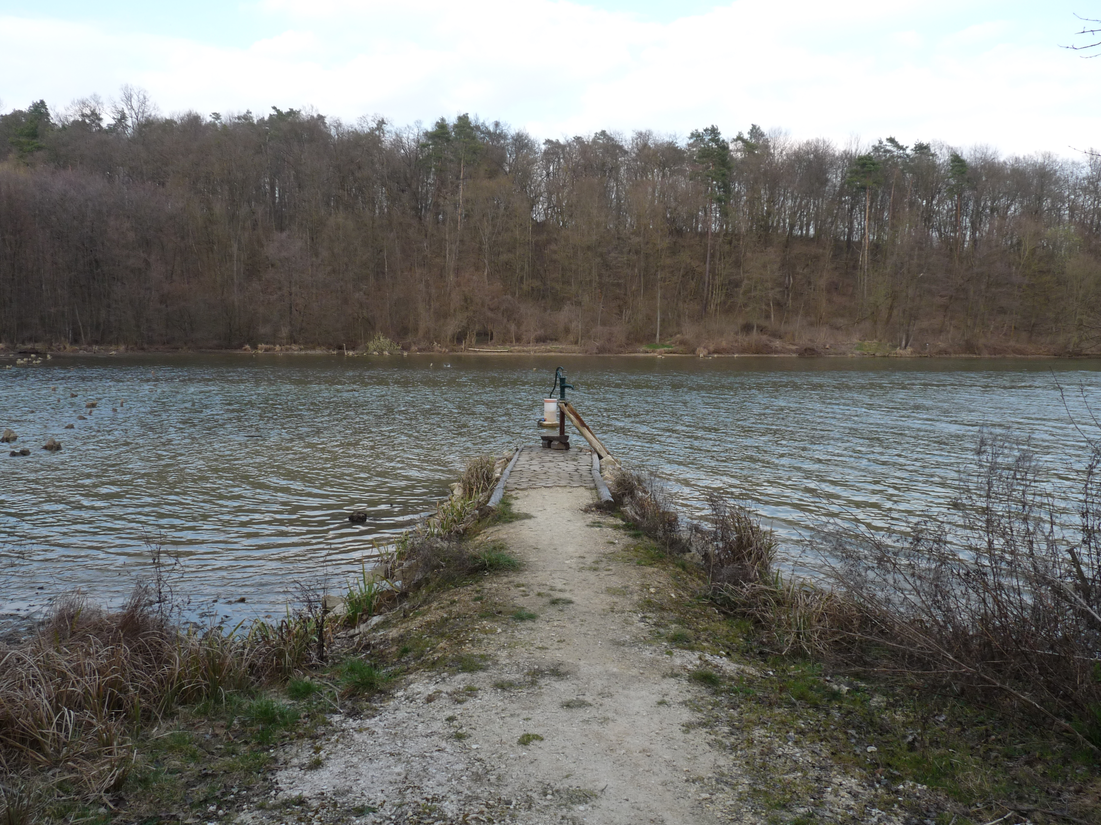 Vodná nádrž Tesáre